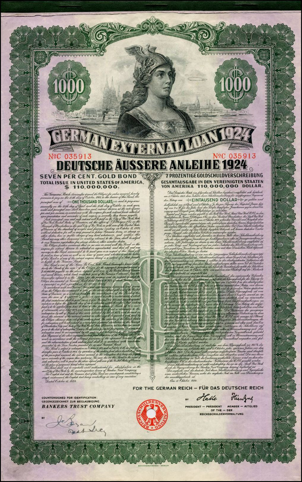 Amerikanische Tranche der Dawes-Anleihe: Deutsches Reich (Deutsche Äußere Anleihe - German External Loan) 7% Gold Bond über 1.000 $ von 1924 – fällig am 15. Oktober 1949; aus dem Fundus BARoV/ Busso Peus